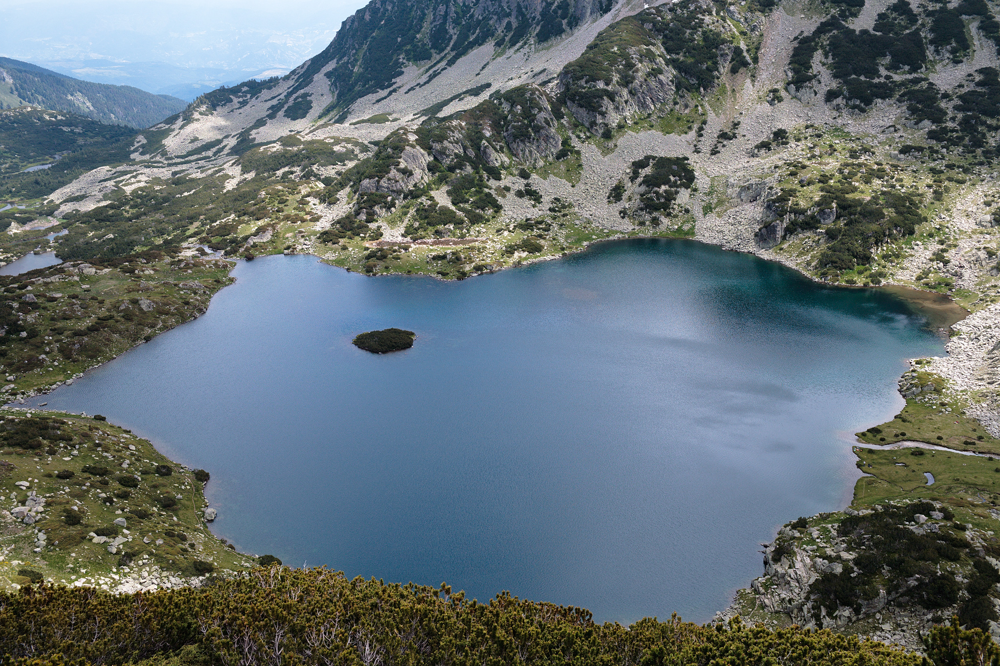 Пирин, Пирин, Попово езеро